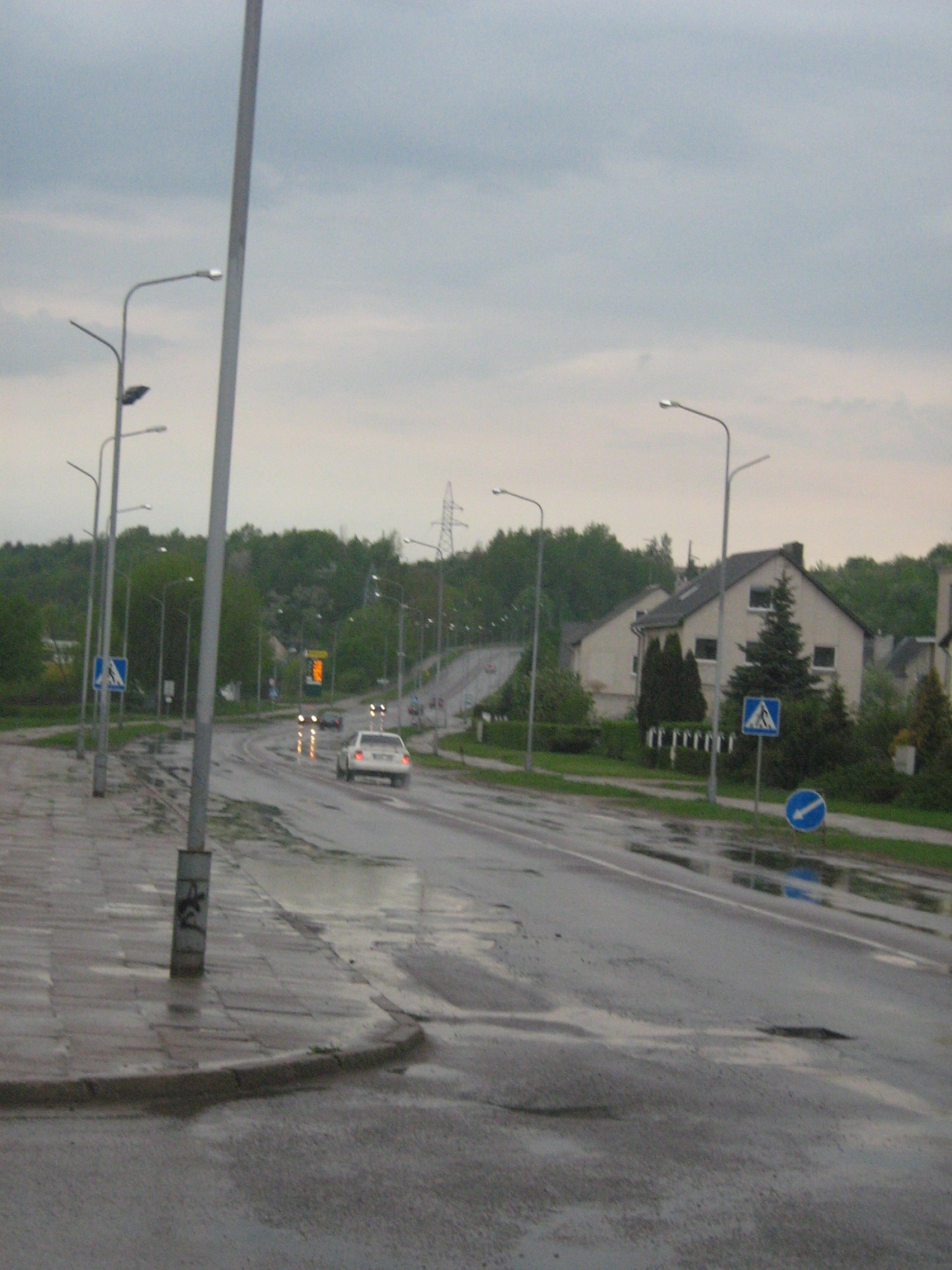 Vasario 16 gatvė nuo vidurio